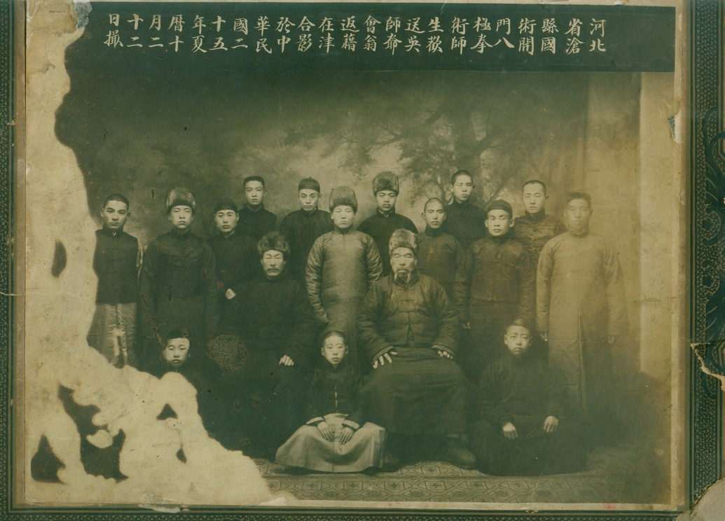 Wu HuiQing (吴会清 - assis à droite), son fils Wu XiuFeng (吴秀峰 - debout à la droite de son père) et leurs disciples. Photographie prise à Tianjin en 1936